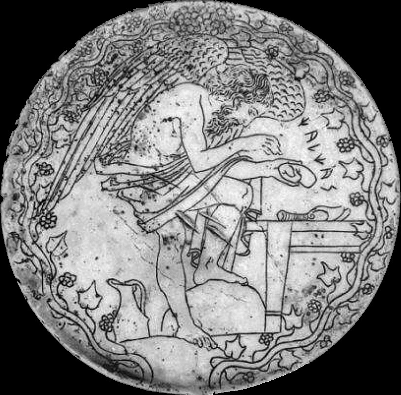 Miroir étrusque avec représentation de Calchas sous la forme d'un Haruspice. Vulci, Ve siècle av. JC. Musée du Vatican. Couleurs inversées